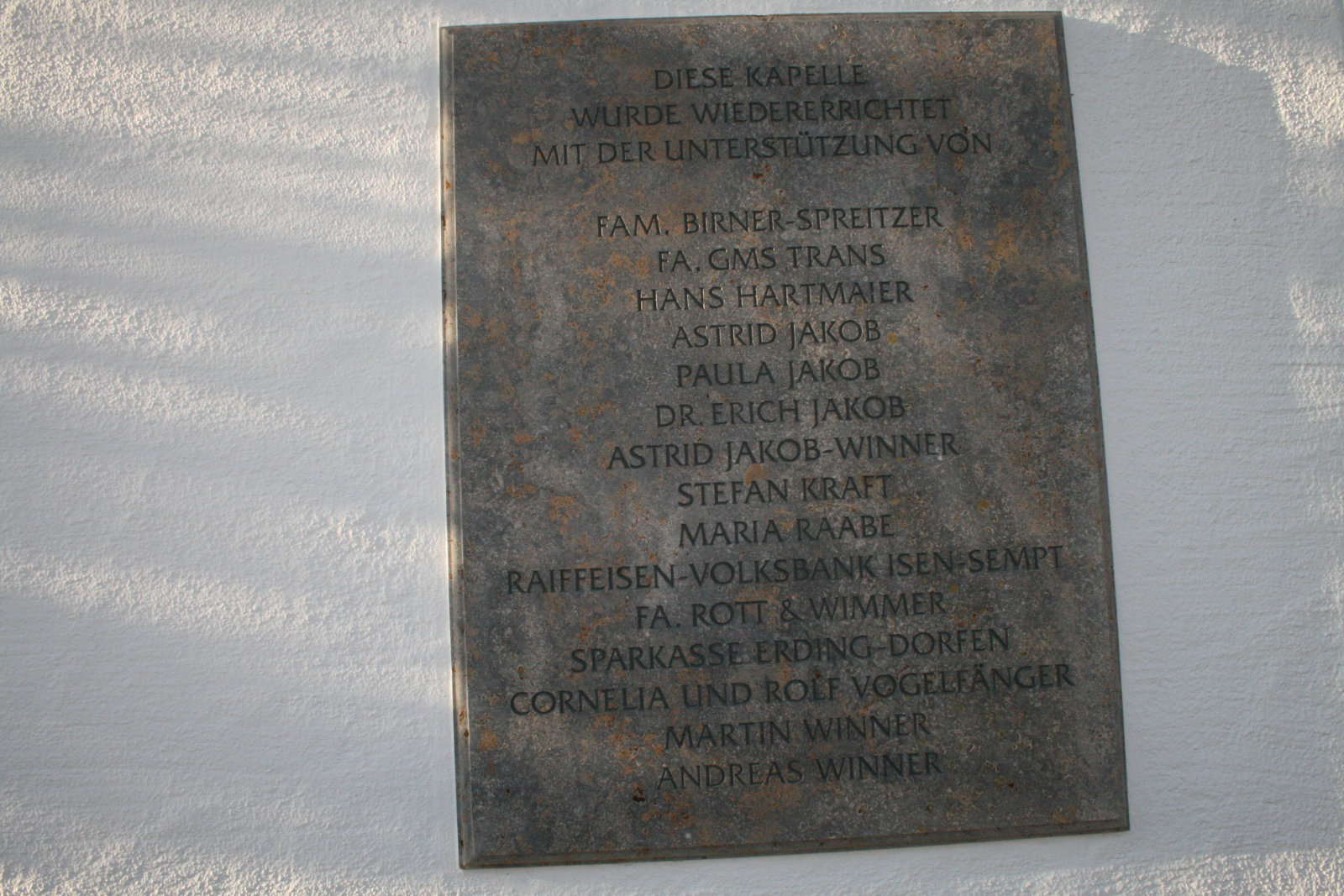 Spendentafel